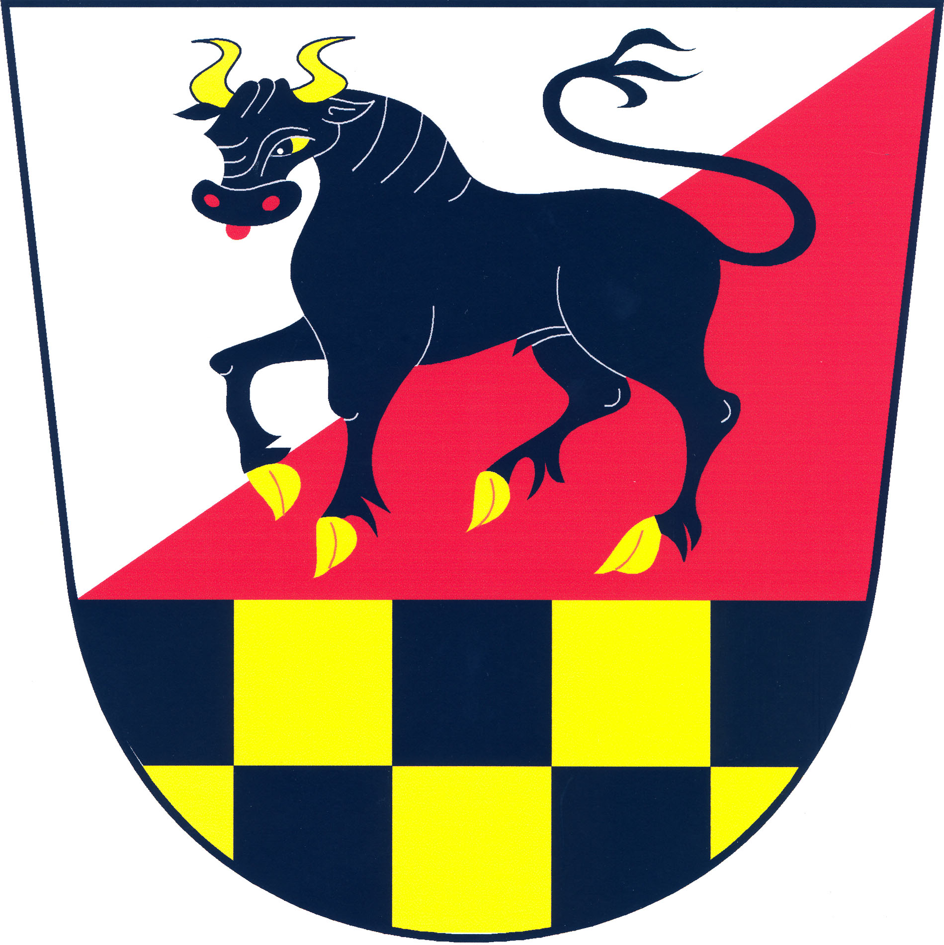 Znak obce Bylany (okres Chrudim)